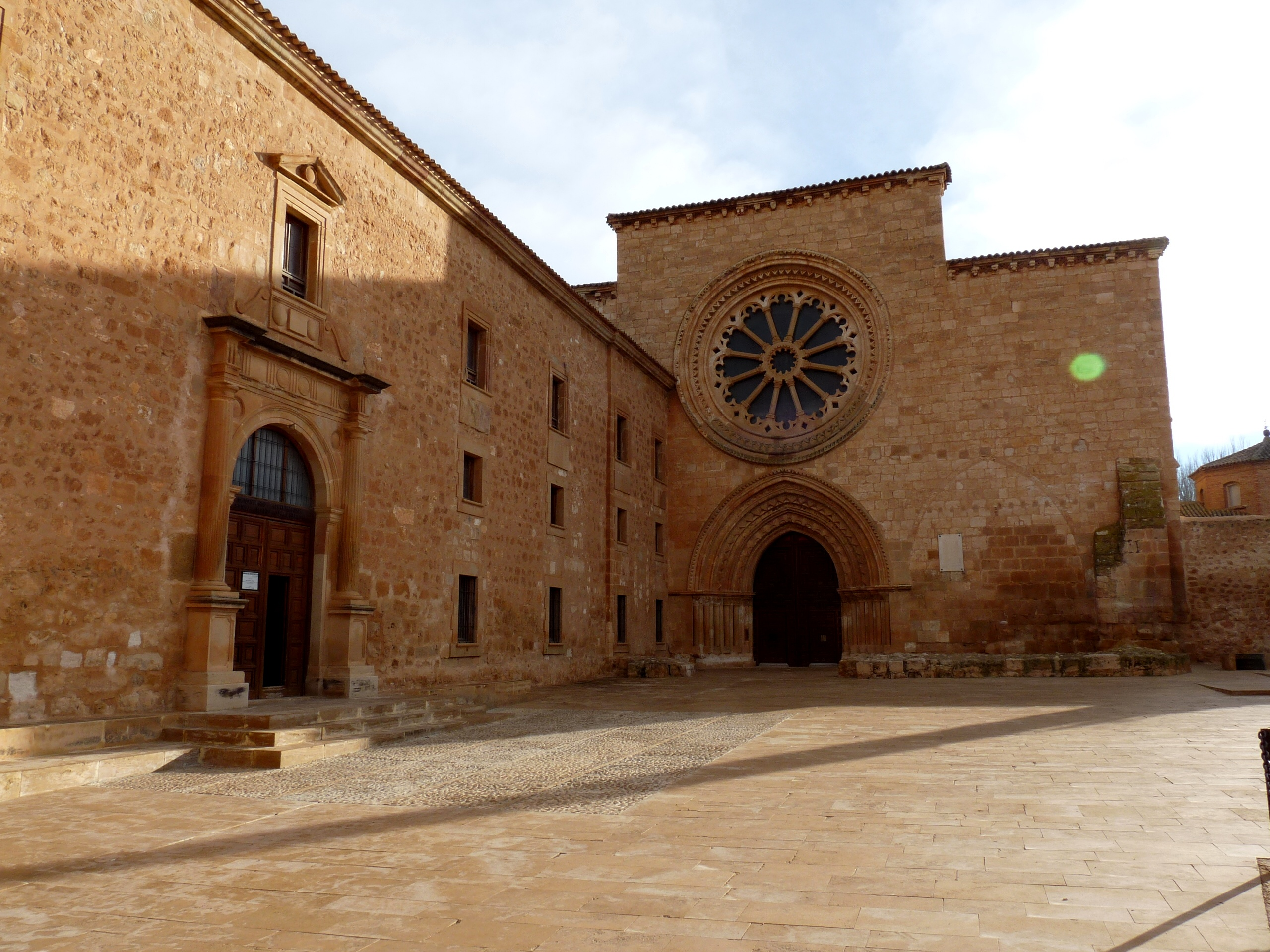 Monaterio de Santa María de Huerta - Fachada iglesia y entrada monsterio